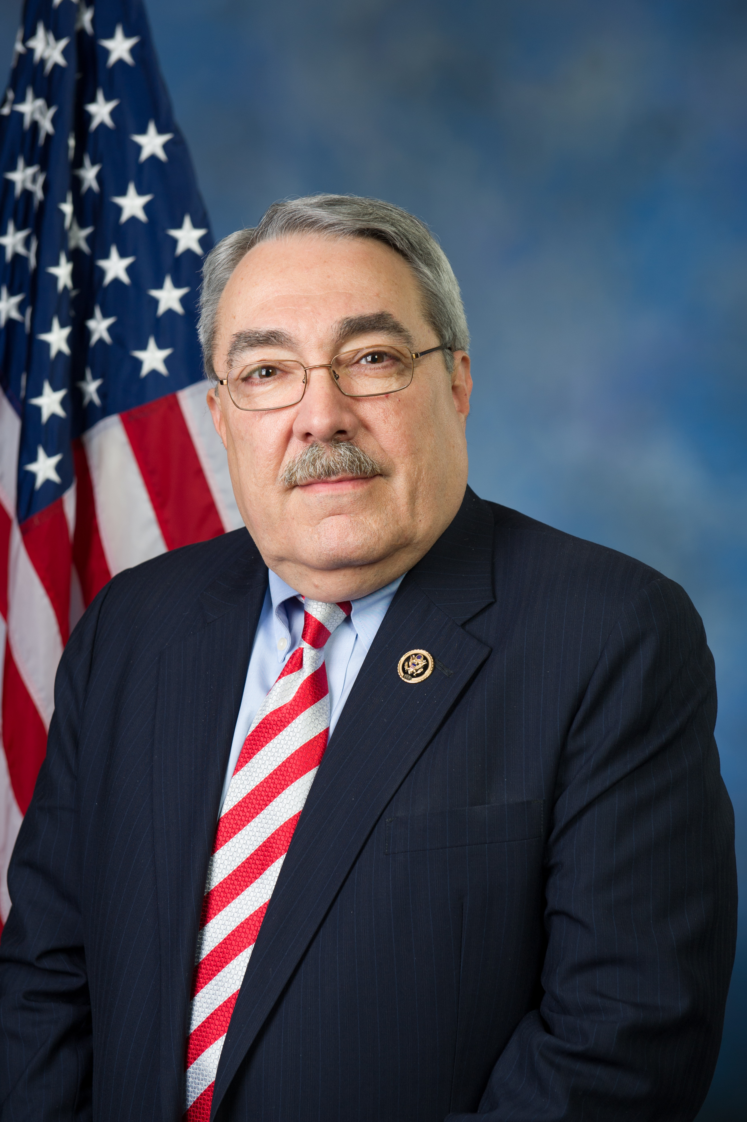 U.S. Rep. G.K. Butterfield